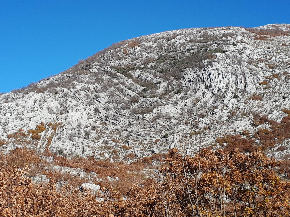 Полукружне седиментне стијене на брду Веља Гора